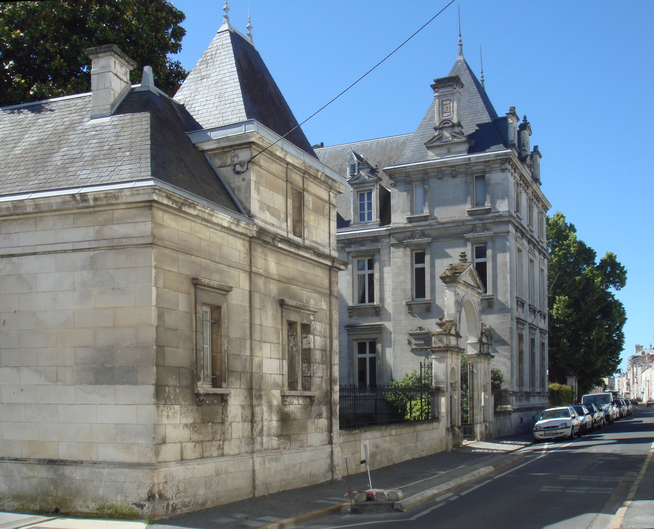 Musée d'Orbigny Bernon 2 rue Saint-Côme à La Rochelle (Charente-Maritime - France).